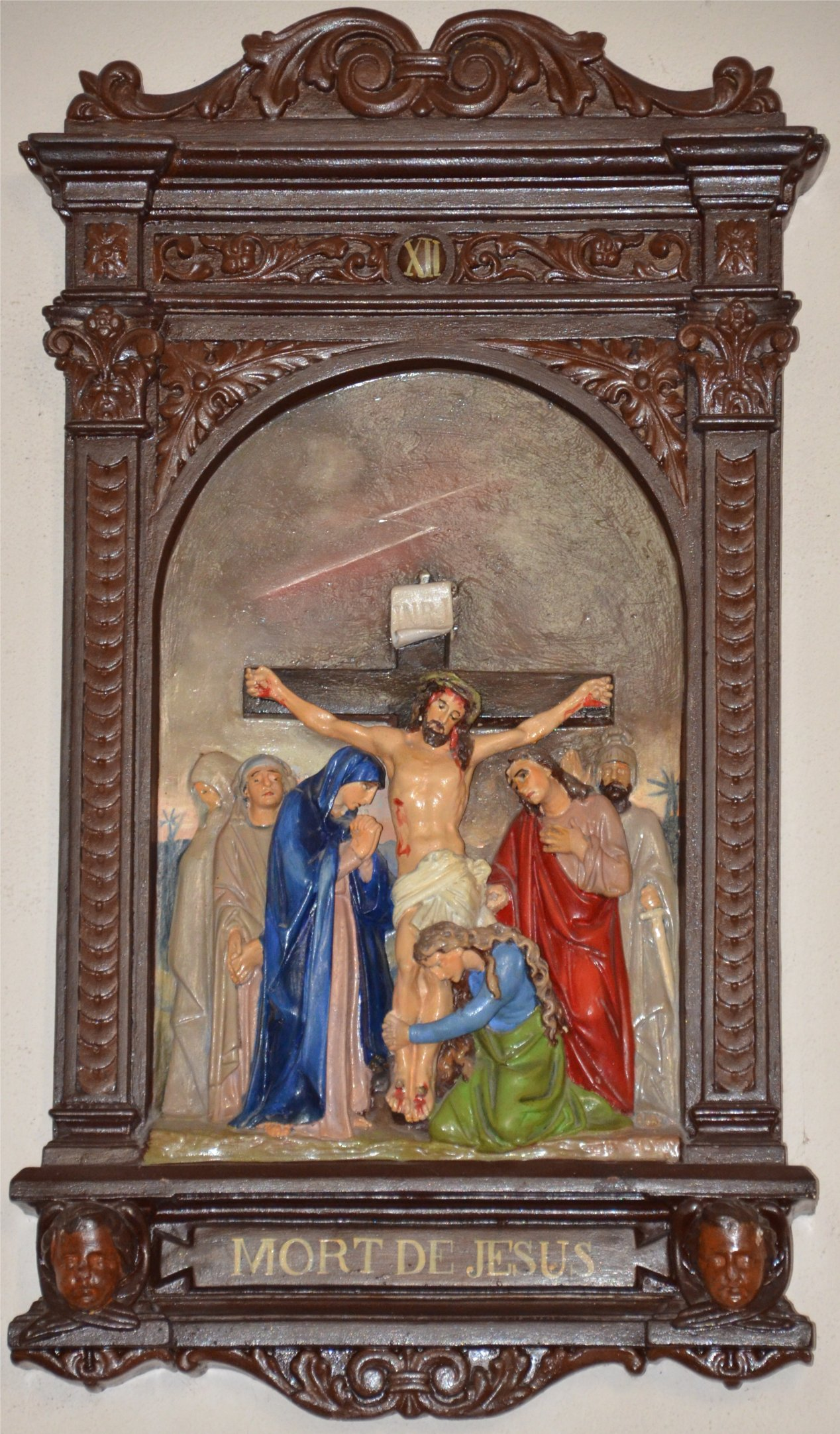 Station 12 du Chemin de Croix de l'église du Christ-Roi de Fey.